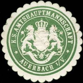 Sealing stamp Title: Königlich Sächsische Amtshauptmannschaft Auerbach Description: grün, weiß, geprägt Place: Auerbach size: 4 cm